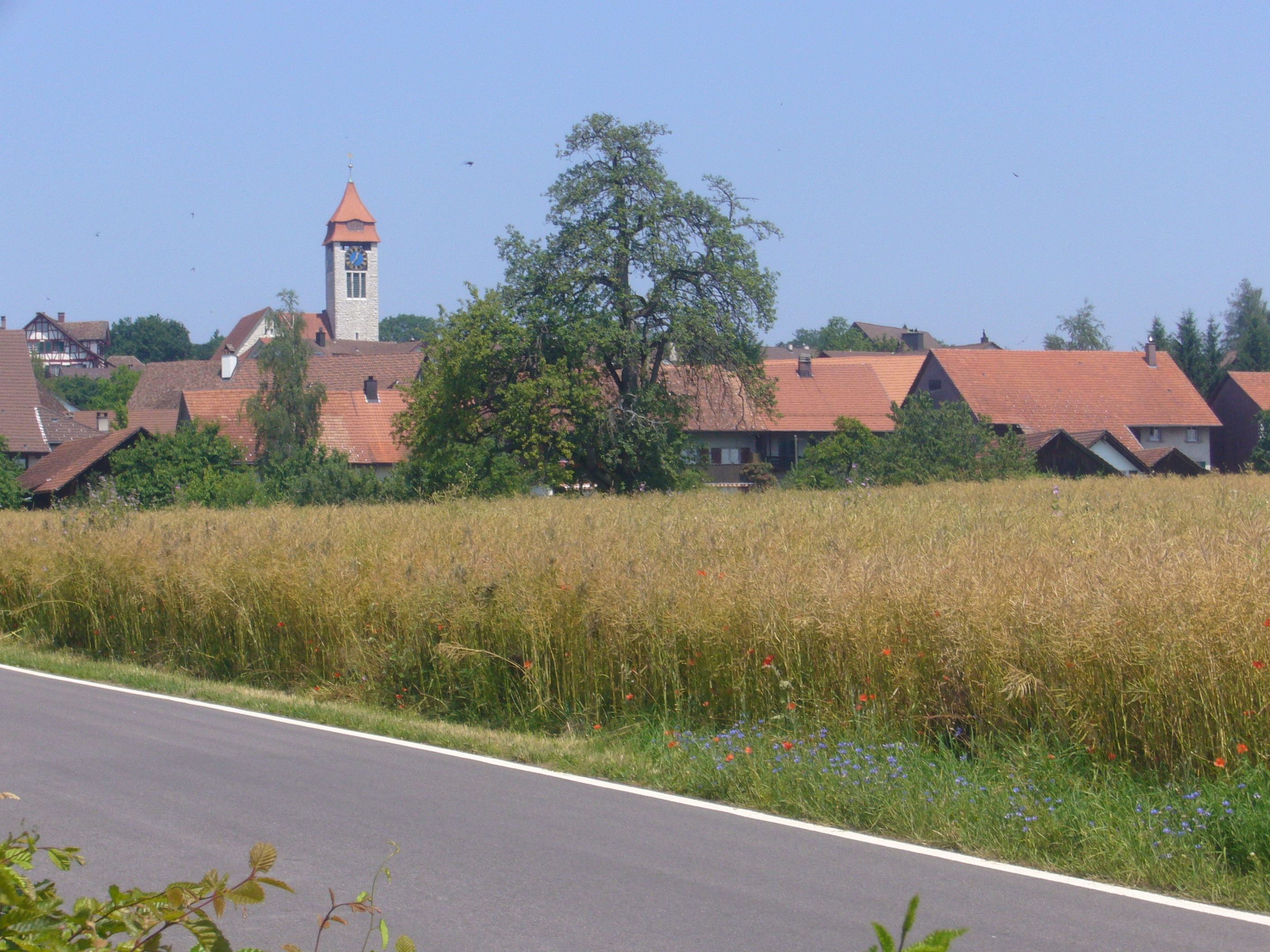 Brütten vom südlichen Dorfeingang her gesehen.